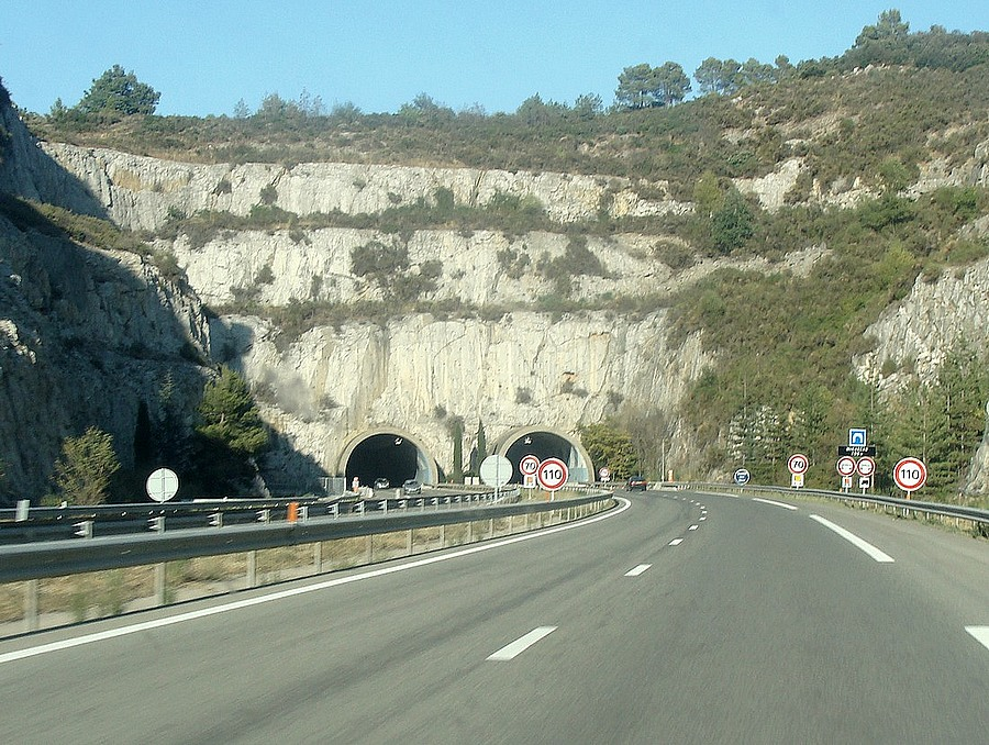 Présignalisation du tunnel de Jouques (franchissement du défilé de Mirabeau), sens montant (Marseille vers La Saulce)